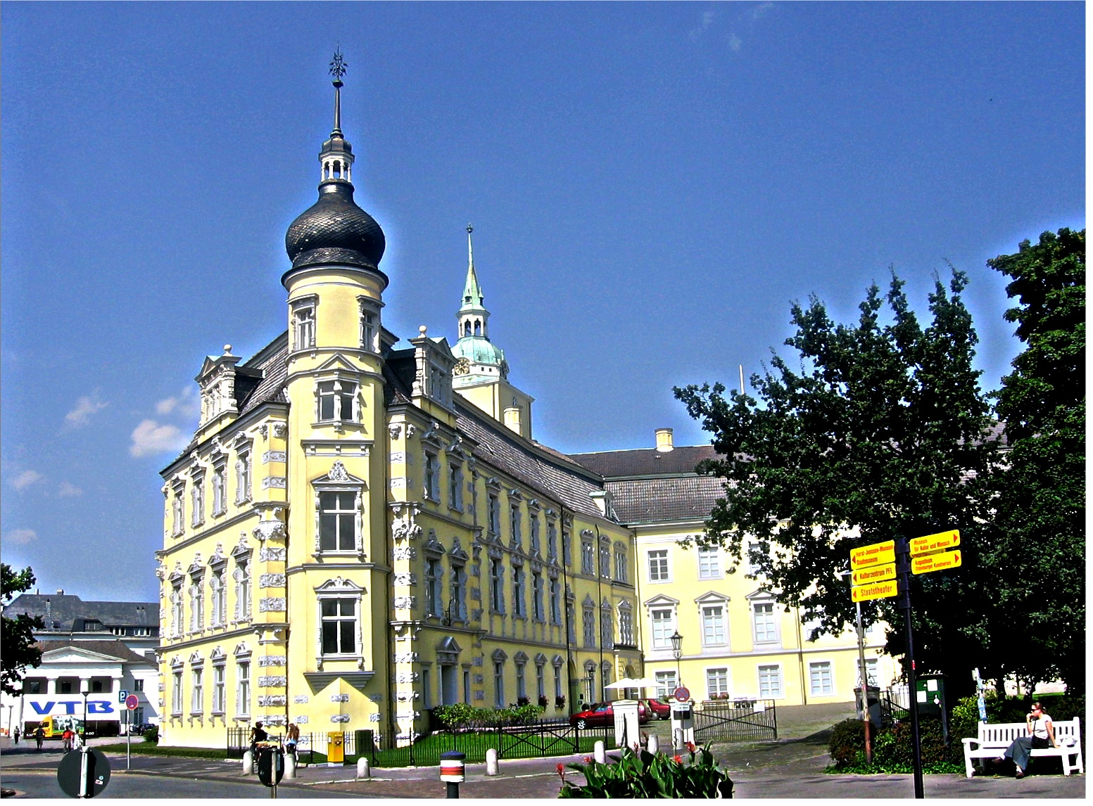 Slott Ollnborg